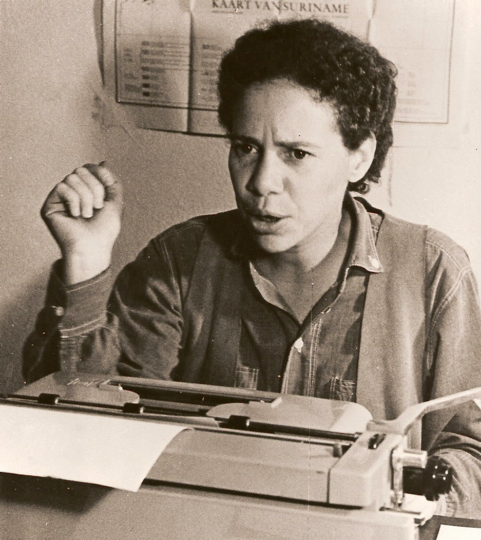 Thea Doelwijt, Surinaams schrijfster. Scan uit eigen archief met toestemming van de auteur.